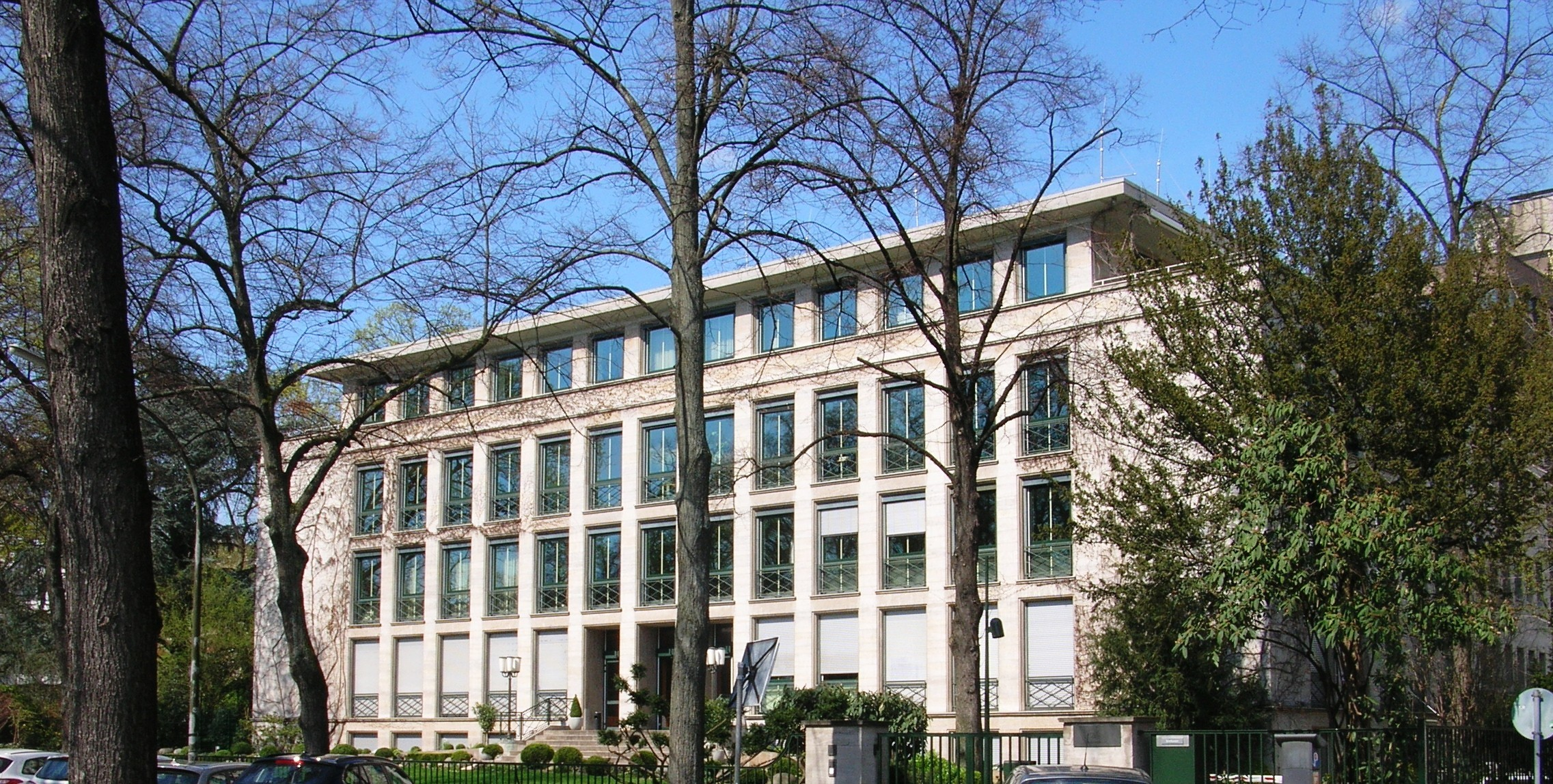 Hauptverwaltungsgebäude der Kölnischen Rückversicherung, heute GenRe, Theodor-Heuss-Ring 11, Köln-Neustadt Nord; Architekten Hermann von Berg und Hanns Koerfer.